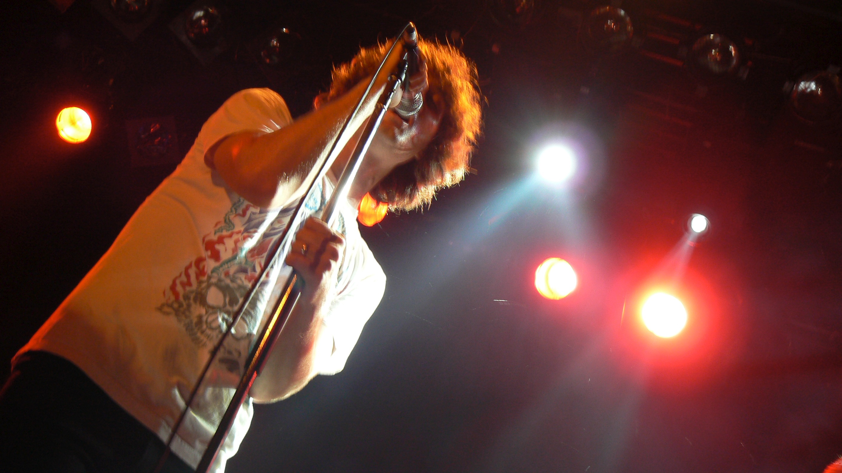 Luke Jenner from The Rapture playing at de Melkweg in Amsterdam.